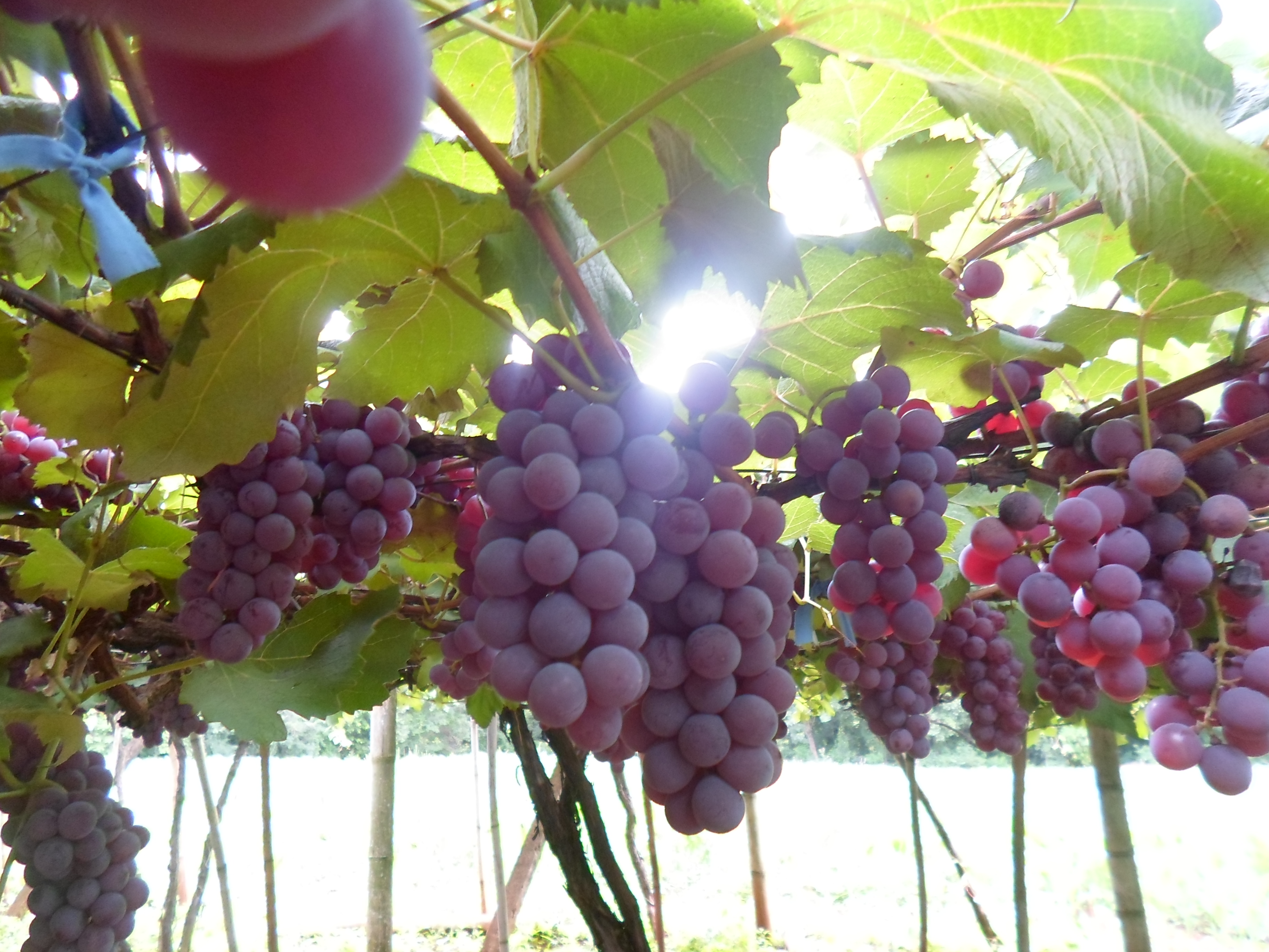 Uva Niagara